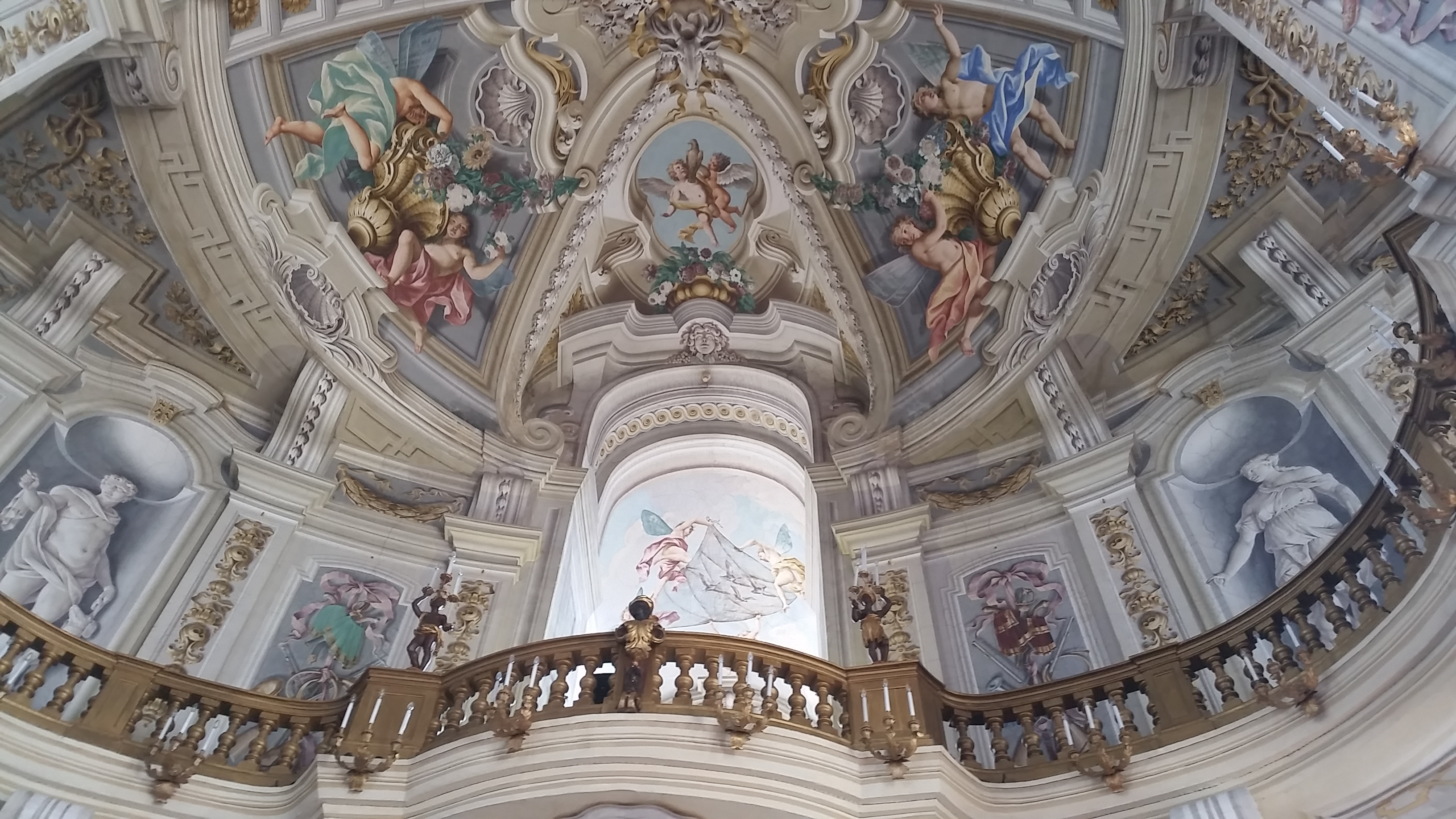 Il salone centrale della Palazzina di Stupinigi, Stupinigi, frazione di Nichelino, Piemonte, Italia.